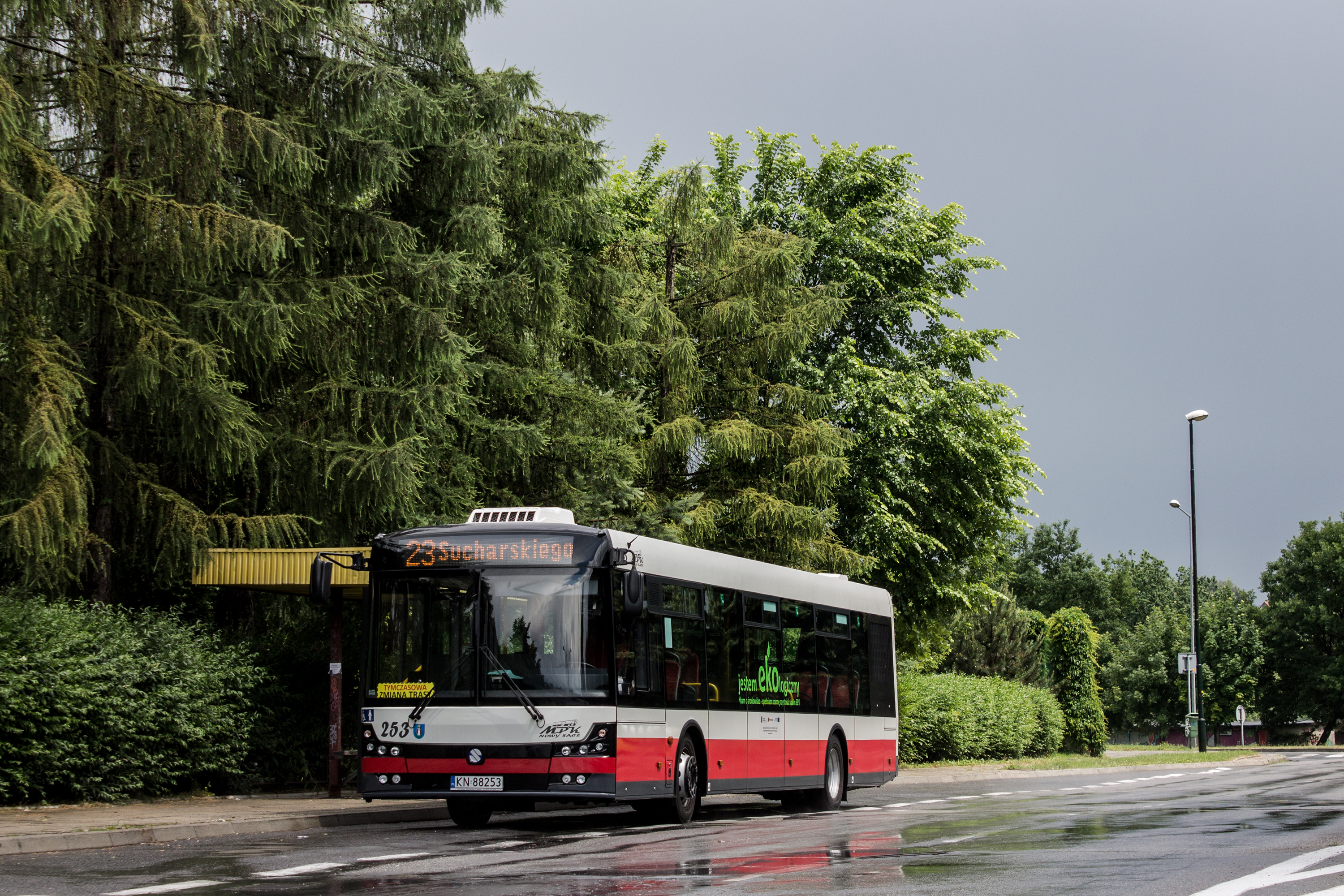 Solbus SM12 #253 w malowaniu MPK Nowy Sącz.